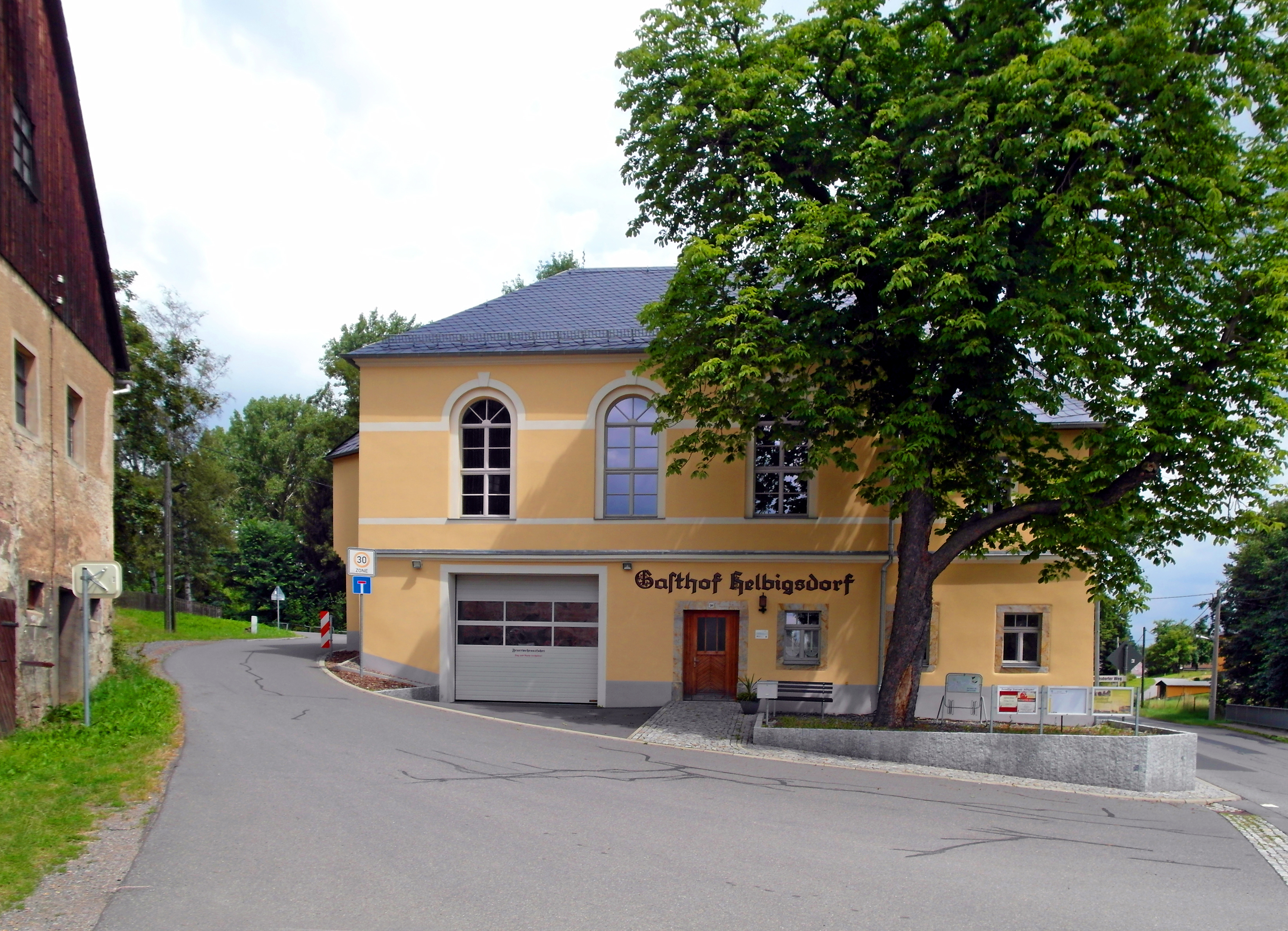 11.07.2018 09619 Helbigsdorf (Mulda): Dorfgasthof, Hauptstraße / Ecke Müdisdorfer Weg (GMP: 50.811073,13.366182). Erbaut 1864. In der DDR-Zeit beliebter kultureller Veranstaltungsort. 1986 wurde der Gasthof geschlossen. Ab 2014 Sanierung und Umbau, jedoch ohne Gastronomie. Dafür mit Feuerwehr und dem Verein „Drei weiße Birken“ e. V. [SAM6703.JPG]20180711200DR.JPG(c)Blobelt